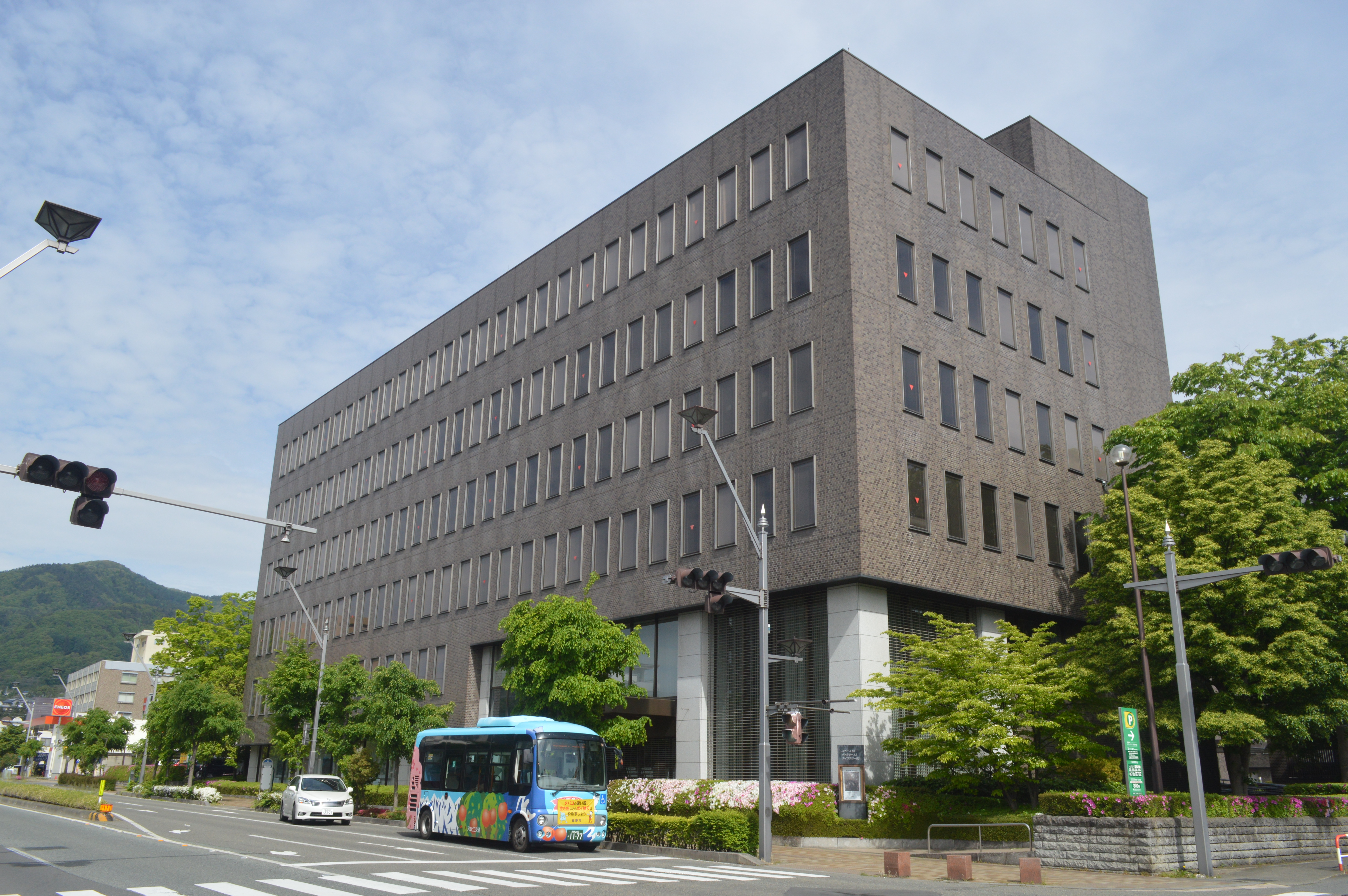 長野県長野市の八十二銀行本店別館。ライブラリー82などが入っている。